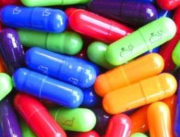 Ecstasy in Kapselform